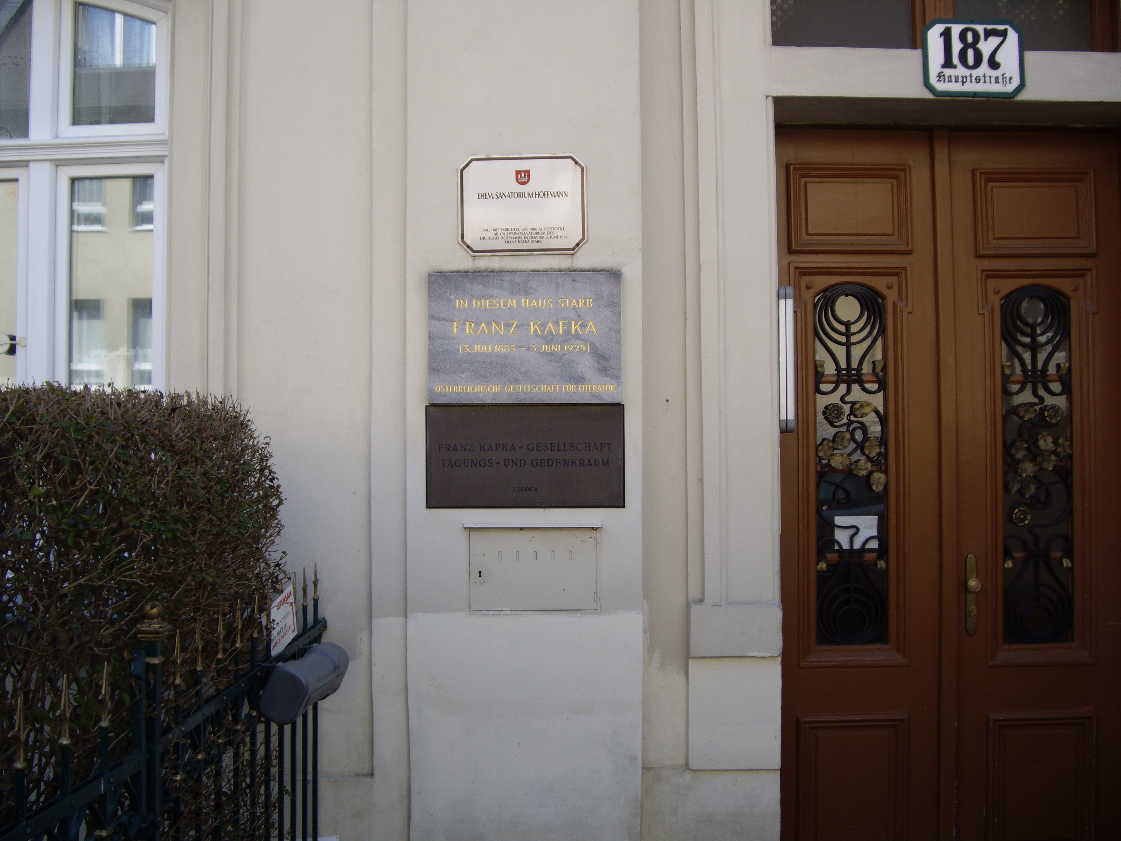 Franz Kafka memorigejo en Kierling